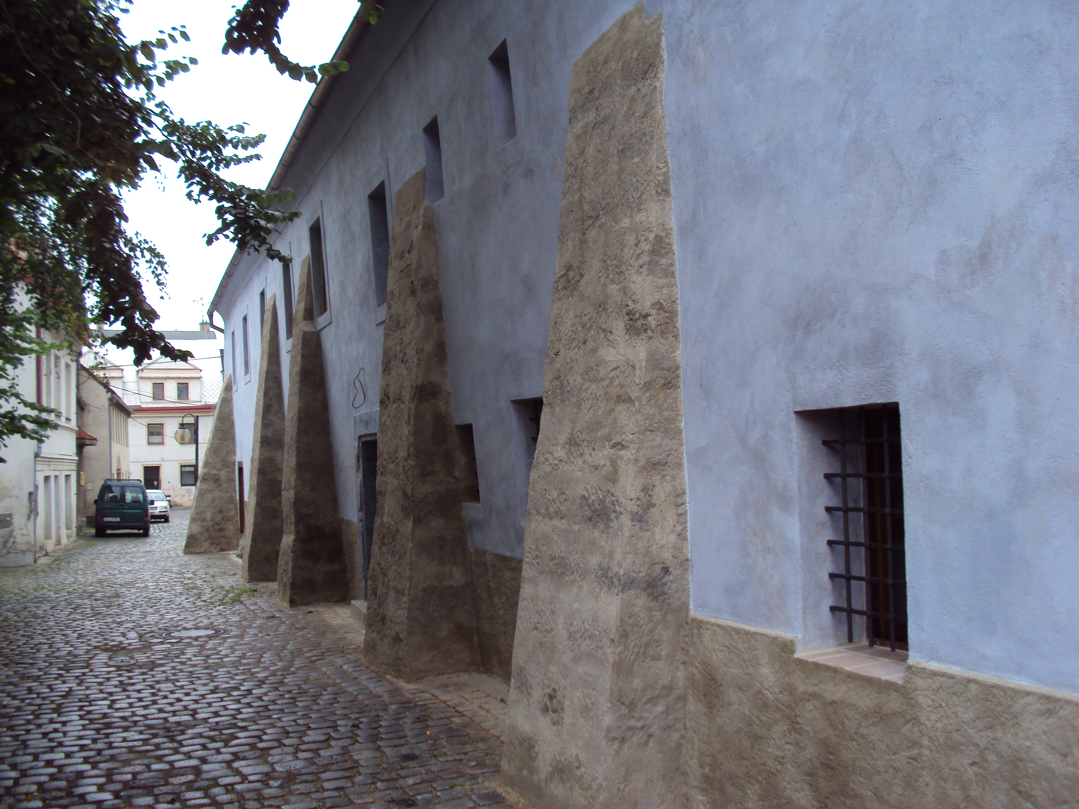 Stará šatlava ve Vězeňské ulici nad náměstím TGM v České Lípě, upravována pro místní muzeum